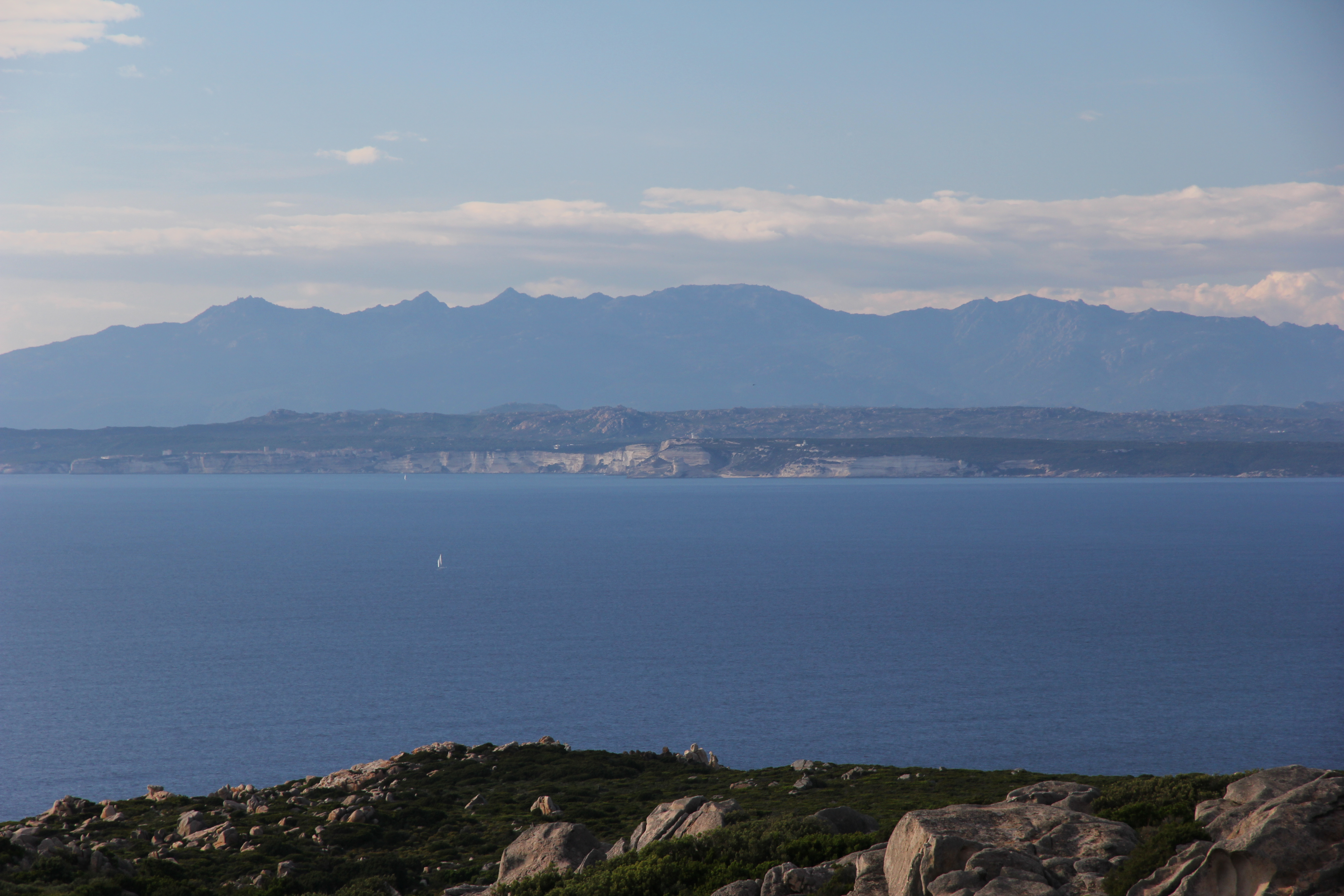 Santa Teresa Gallura - Bocche di Bonifacio